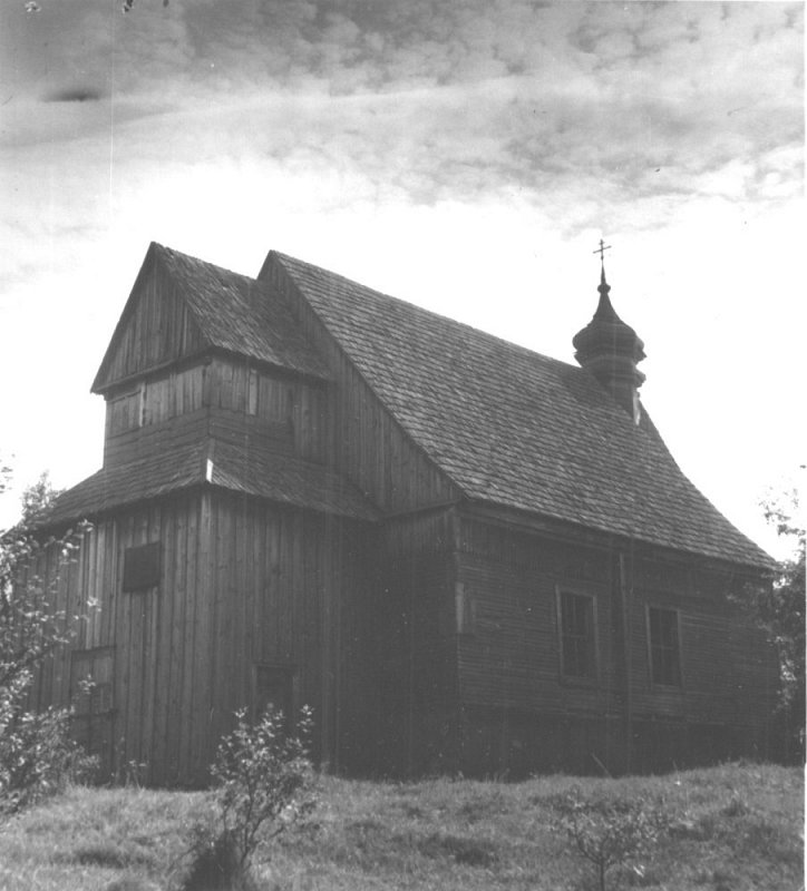 Беларуская (тарашкевіца): Яглевічы (Jahlevičy). Царква